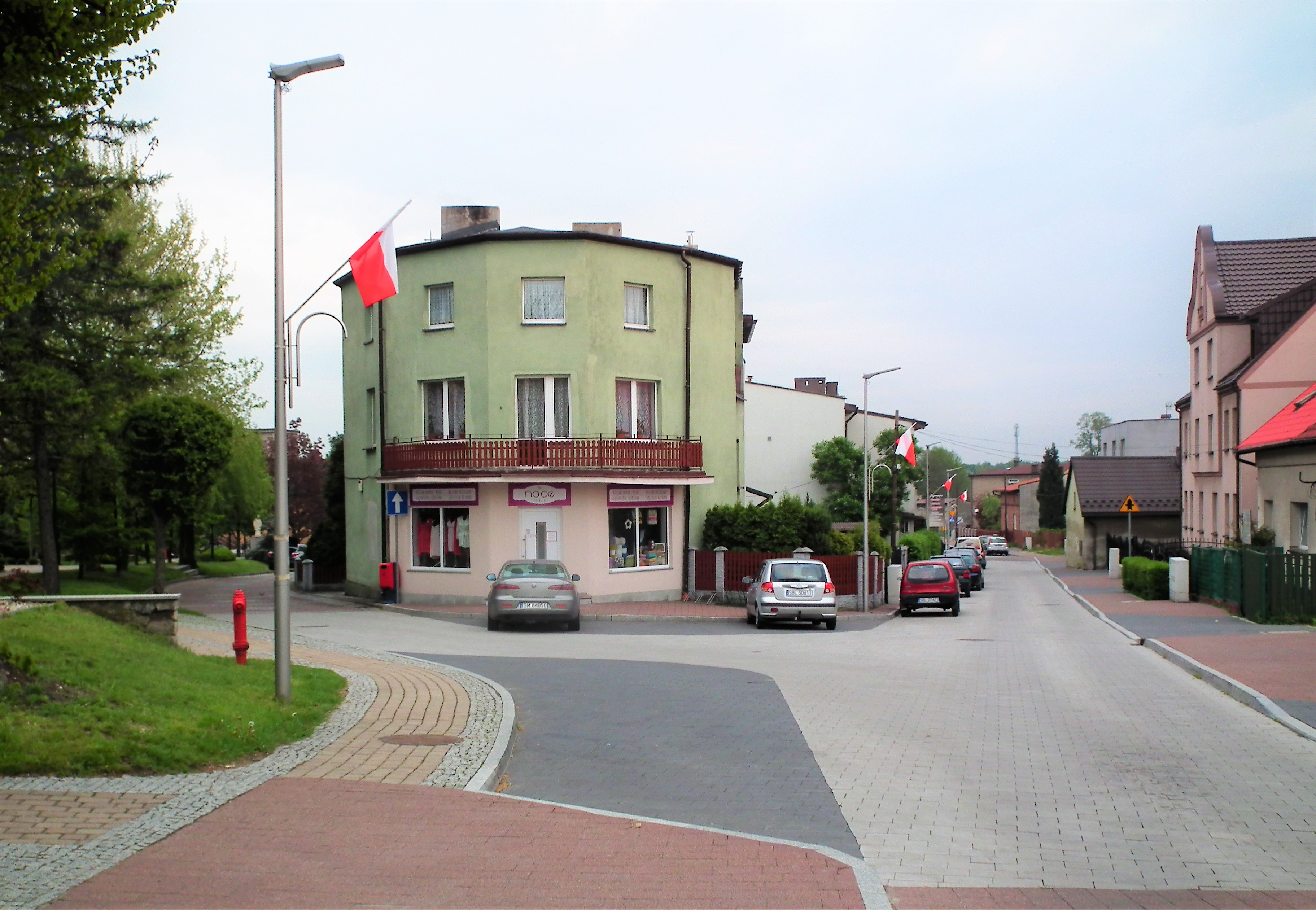 Imielin. Centrum.